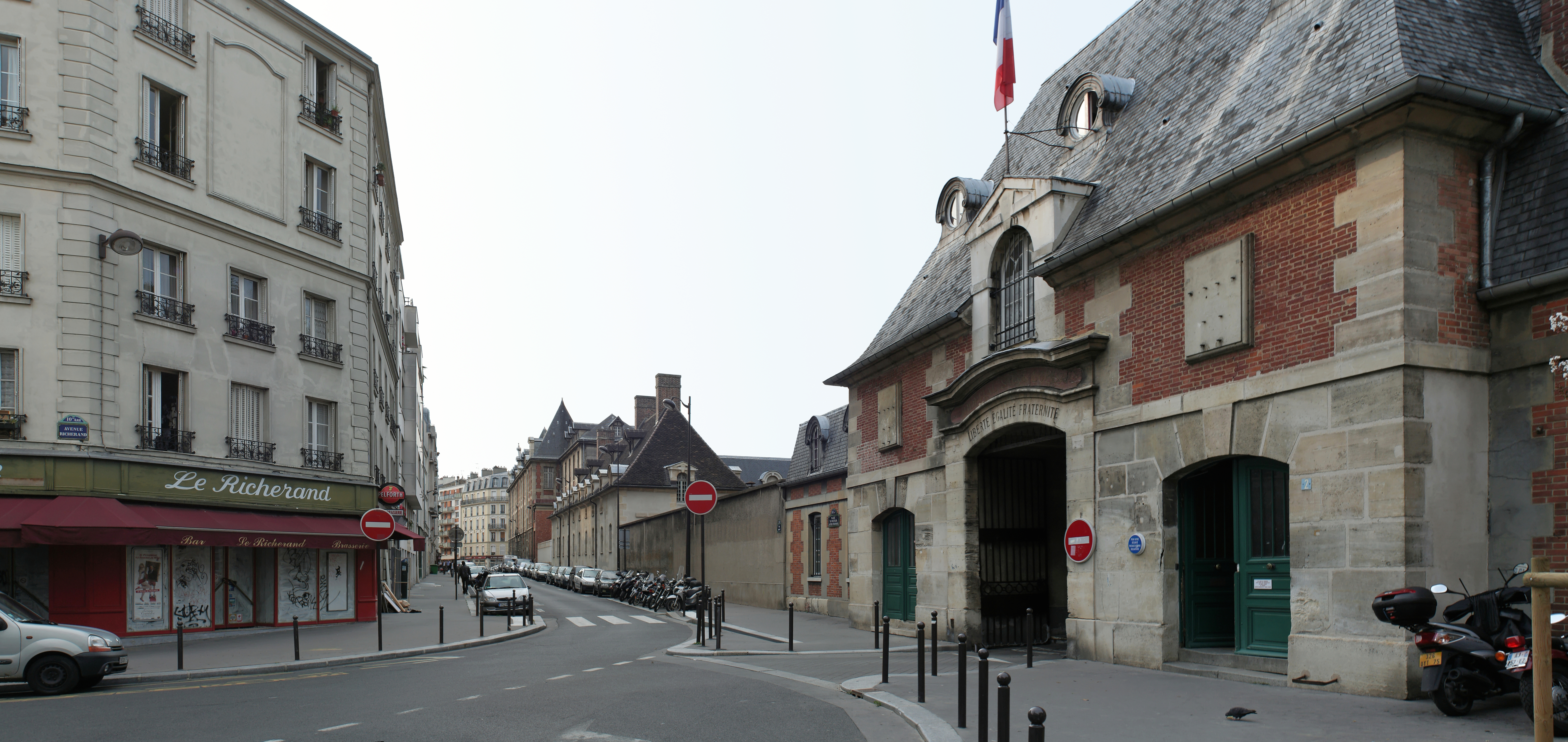 Paris, place du Docteur-Alfred-Fournier et rue Bichat, pavillon d'entrée de l'hôpital Saint-Louis au bout de l'avenue Richerand.